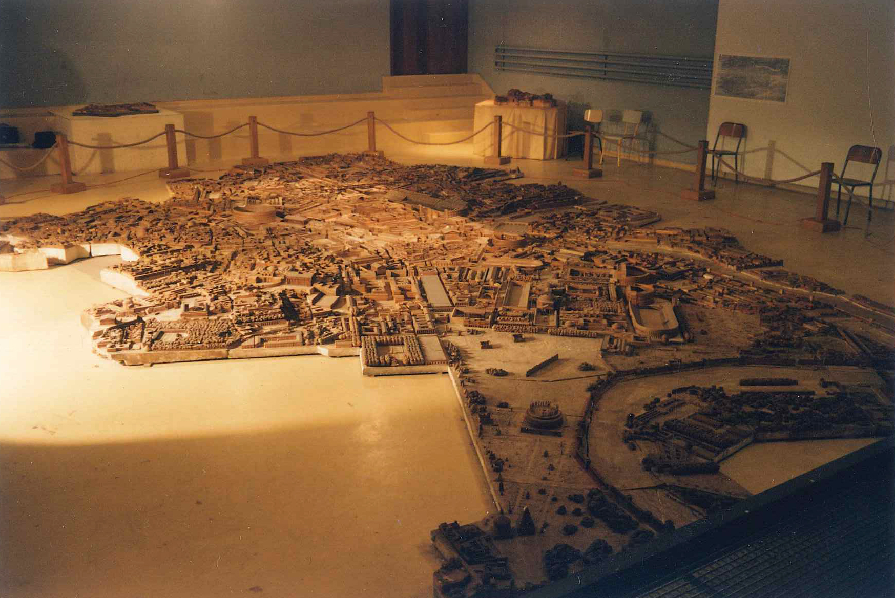 Plan de Rome de Paul Bigot sous-sol bâtiment droit - Université de Caen CIREVE